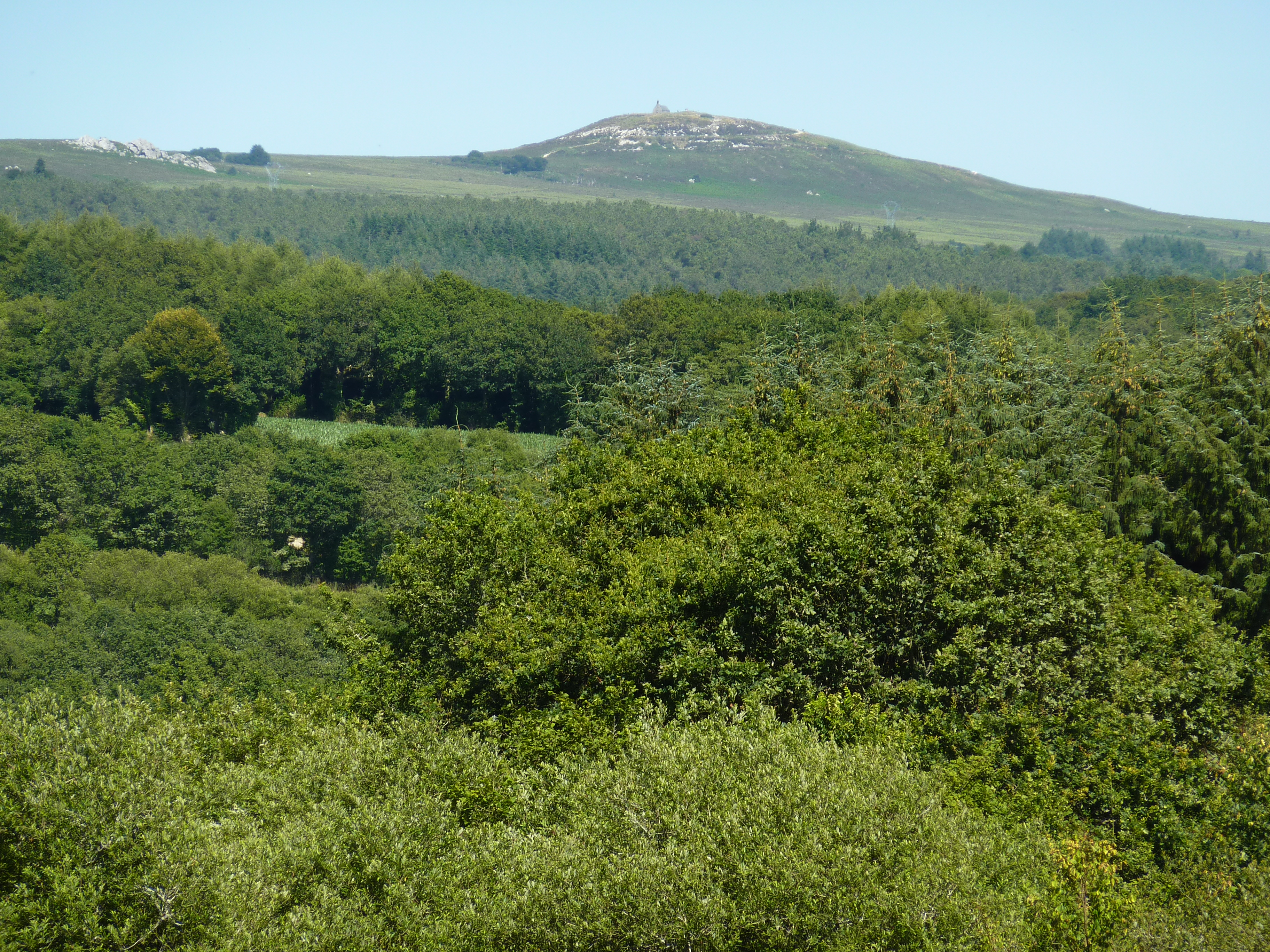 Le mont Saint-Michel-de-Brasparts vu de l'ouest depuis Glujau Ti Riou en Saint-Rivoal